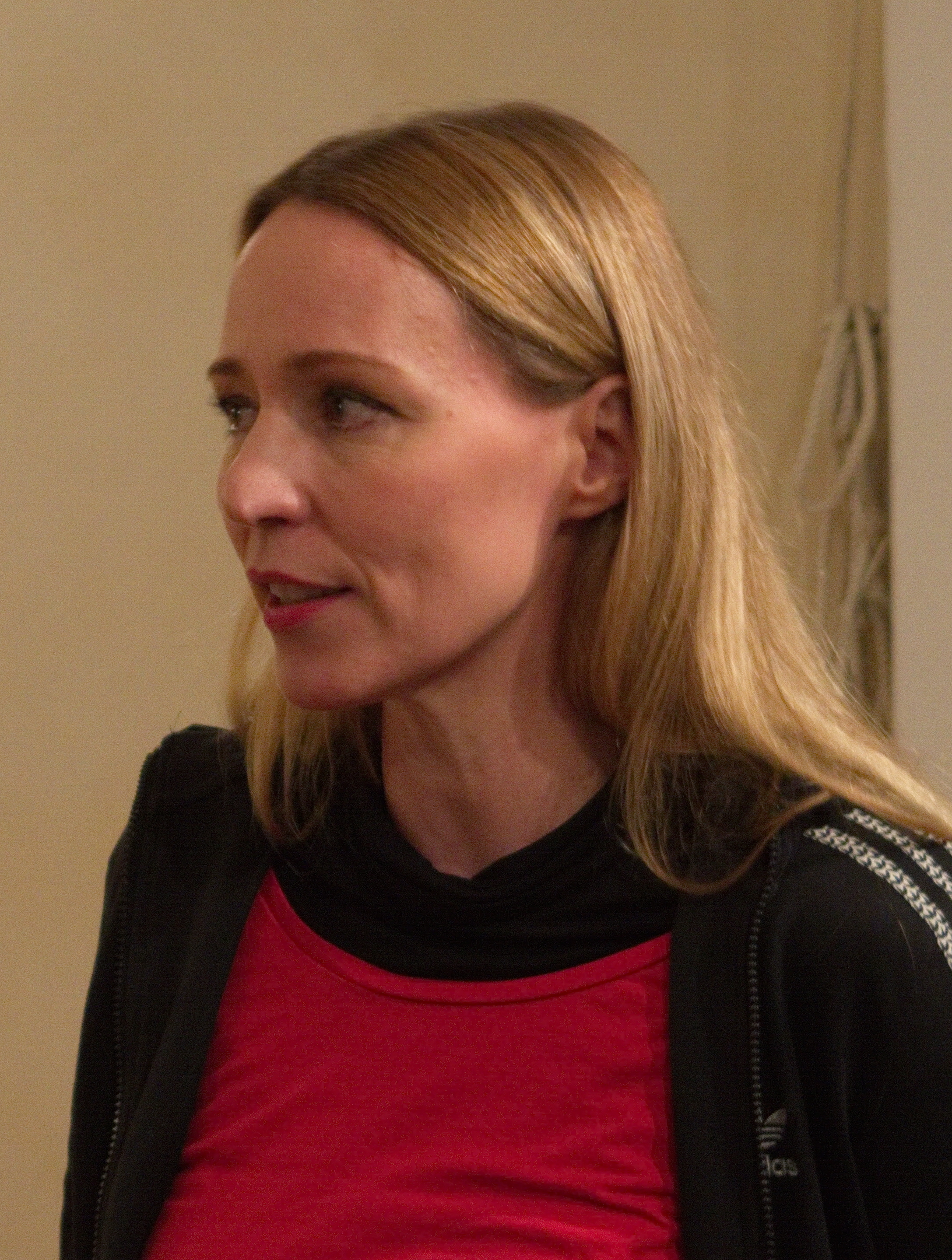 Veranstaltung "Chance oder Krise? Flüchtlingspolitik im Gespräch" mit Dr. Ralf Stegner (Stellv. Parteivorsitzender der SPD, Vors. SPD Schleswig-Holstein), Andreas Mucke (Oberbürgermeister der Stadt Wuppertal), Uwe-Karsten Heye (Vorstandsvorsitzender „Gesicht zeigen! Für ein weltoffenes Deutschland“, Staatssekretär a.D. & Regierungssprecher der Bundesregierung 1998-2002), Bernd Mesovic (Stellv. Geschäftsführer von PRO ASYL), Pfarrer Dr. Jochen Denker (Synodalassessor Ev. Kirchenkreis Wuppertal), Julia Beerhold (Schauspielerin & Sängerin). Moderation: Helge Lindh